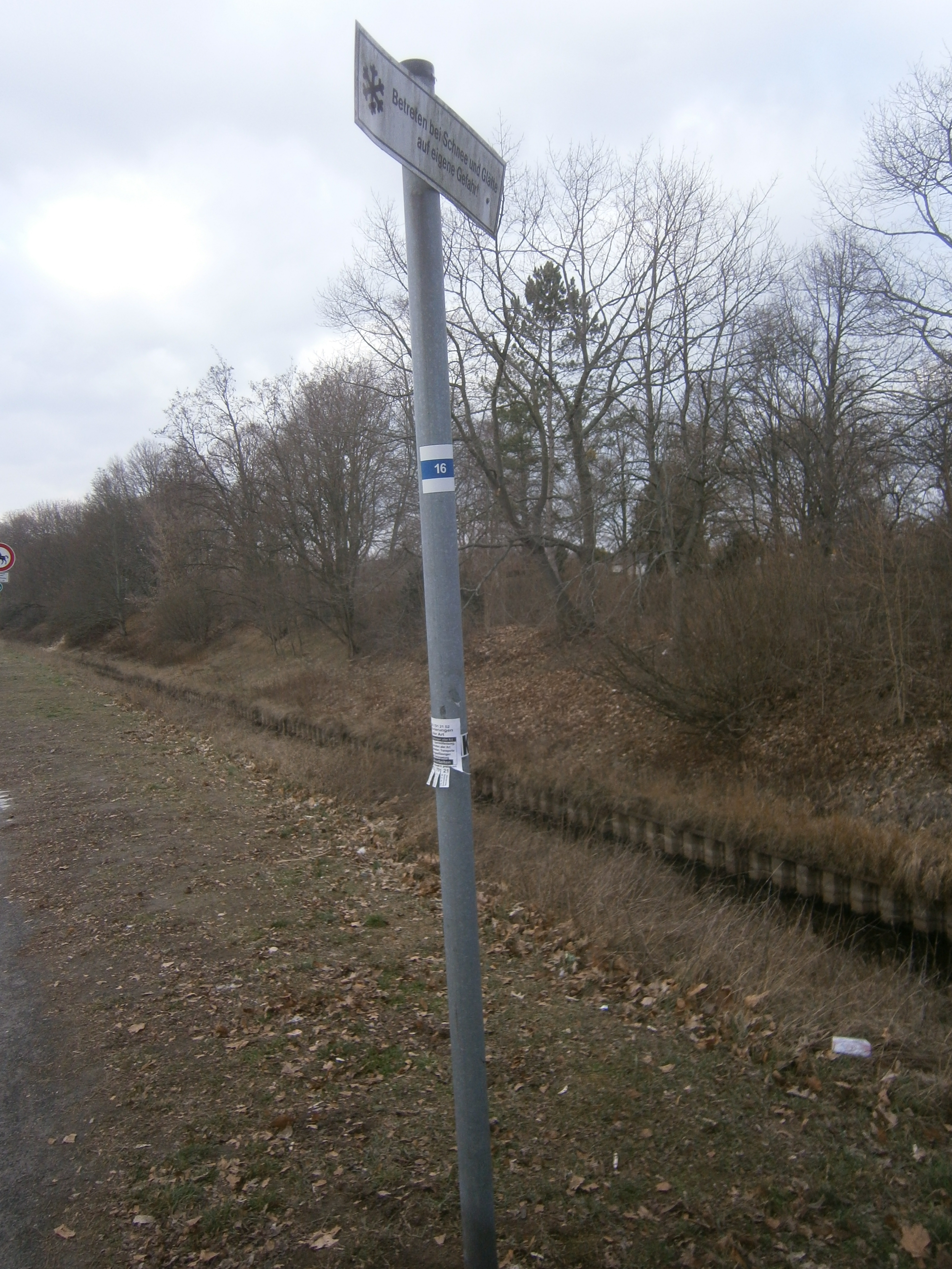 Diese Balkenbrücke (Straßenbrücke) führt die Gorkistraße über den Nordgraben von Tegel nach Wittenau. Sie wurde Die Ortsteilgrenze im Bezirk Reinickendorf liegt am Westufer und die Brücke in voller Länge in Wittenau. Der Verlauf der Grenze[1] bedingt das westliche Widerlager auf der Tegeler Seite. Die Länge der Brücke beträgt 24 Meter, die Breite verringert sich von 48 Meter (Rand zu Tegel) auf 28 Meter nach Wittenau hin. Seit den 1930 Jahren als Dietrich-Eckardt-Straße ist die Gorkistraße von Alt-Tegel im Westen aus zweibahning (100 Meter zwischen den Baufluchten). Die bestehende Brücke ersetzte Ende der 1960er Jahre eine 11 Meter breite Straßenbrücke. Beim Brückenbau folgte die Planung dem Straßenzug Am Nordgraben[2] nach Südosten. Östlich der Brücke hat die Gorkistraße in Wittenau eine Breite von 20 Metern. Die Brückenbreite entspricht dem Übergang von zwei getrennten auf eine Fahrbahn. An der östlichen Brückenseite mit der Mittelinsel des Fußgängerüberweg beginnt diese Zusammenführung.[3] Markierung des Berliner Wanderwegs Nummer 16 der 20 Grünen Hauptwege: Humboldt-Spur an der Westseite des Nordgrabens (hier nach Nord).